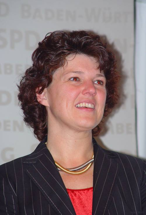 Ute Vogt, SPD-Kandidation bei der Landtagswahl 2006 in Baden-Württemberg bei einer Wahlkampfveranstaltung am 23. März 2006 im Stadthaus in Ulm.